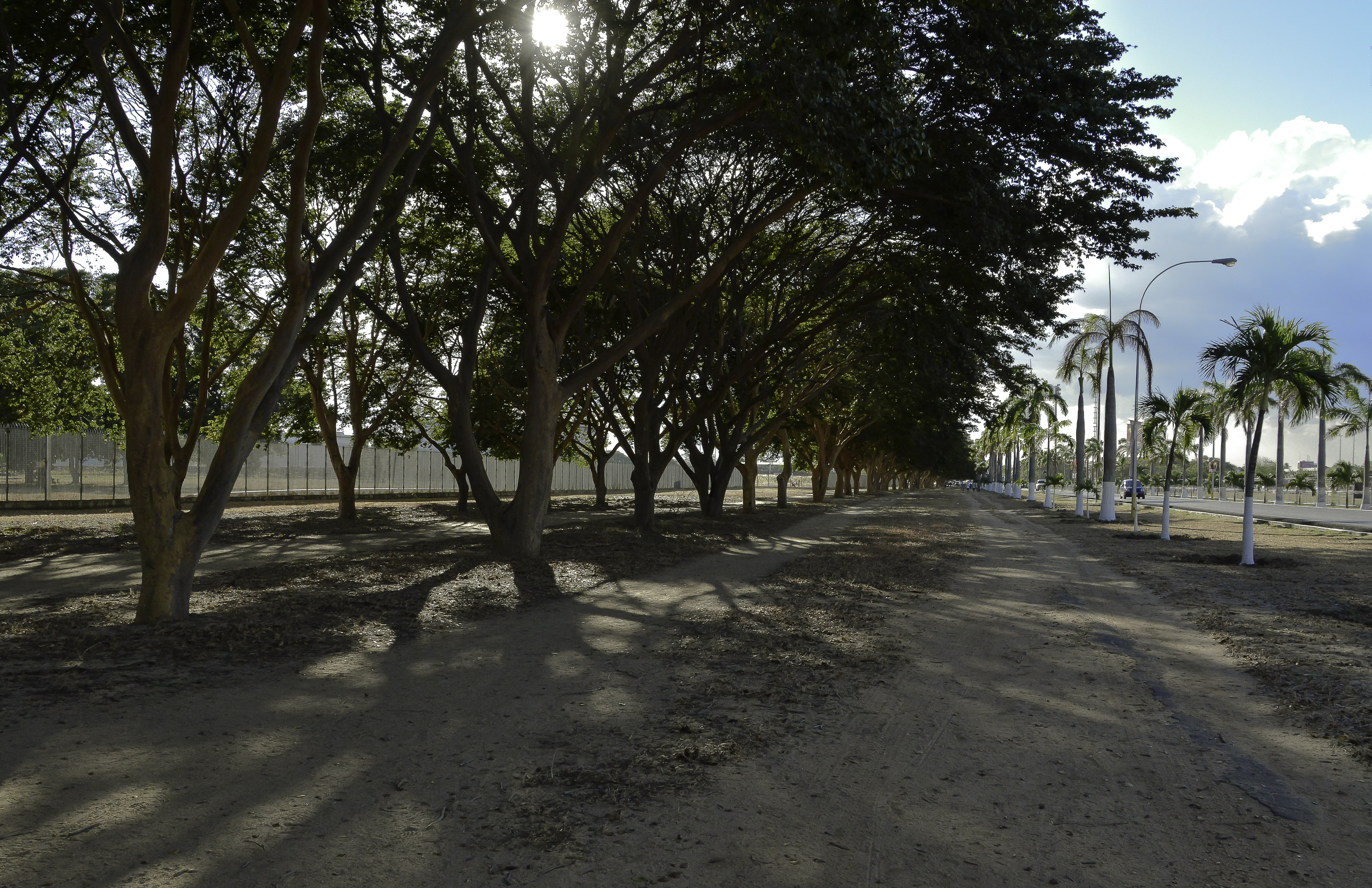 Entrada Campo Rojo Anaco Anzoátegui